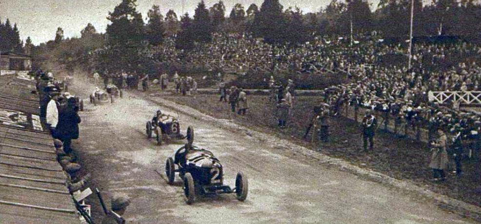 Départ du Grand Prix d'Europe 1925 à Spa, Antonio Ascari devant Campari.